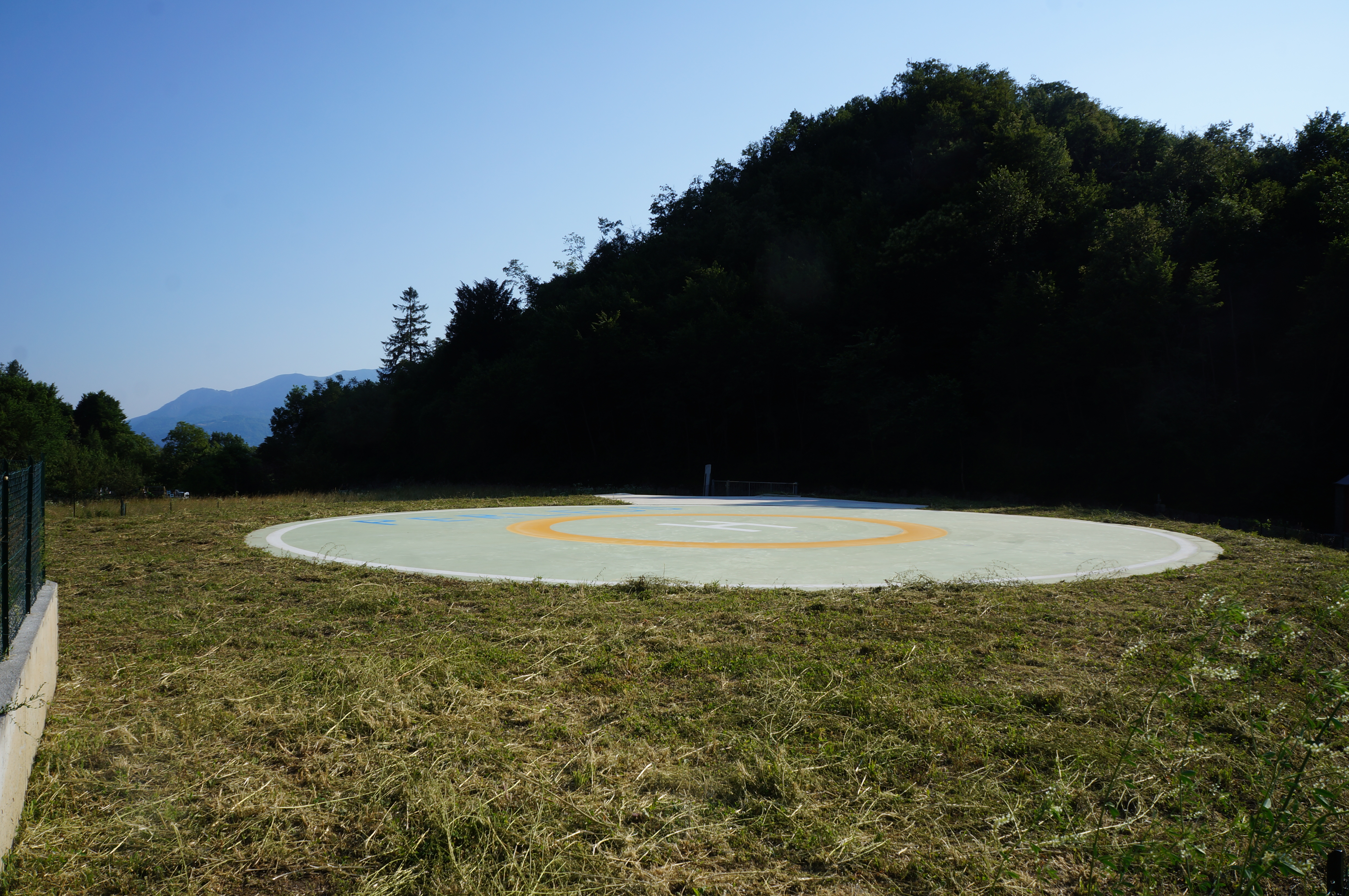 Elisuperficie recintata a servizio del Comune di Perledo. Località Bologna.